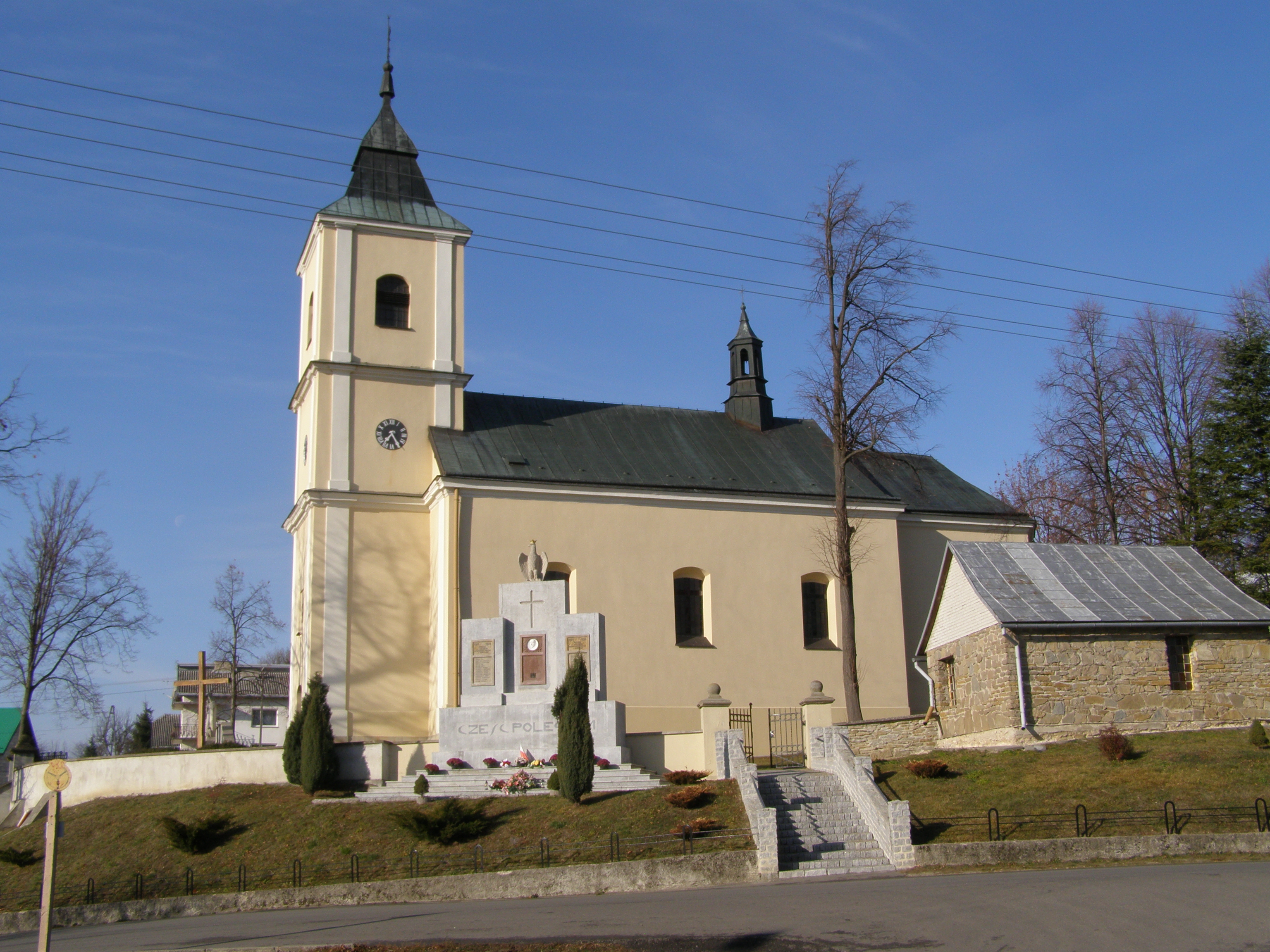 Kościół parafialny p.w. Narodzenia NMP w Kobylanach, datow. na 1775